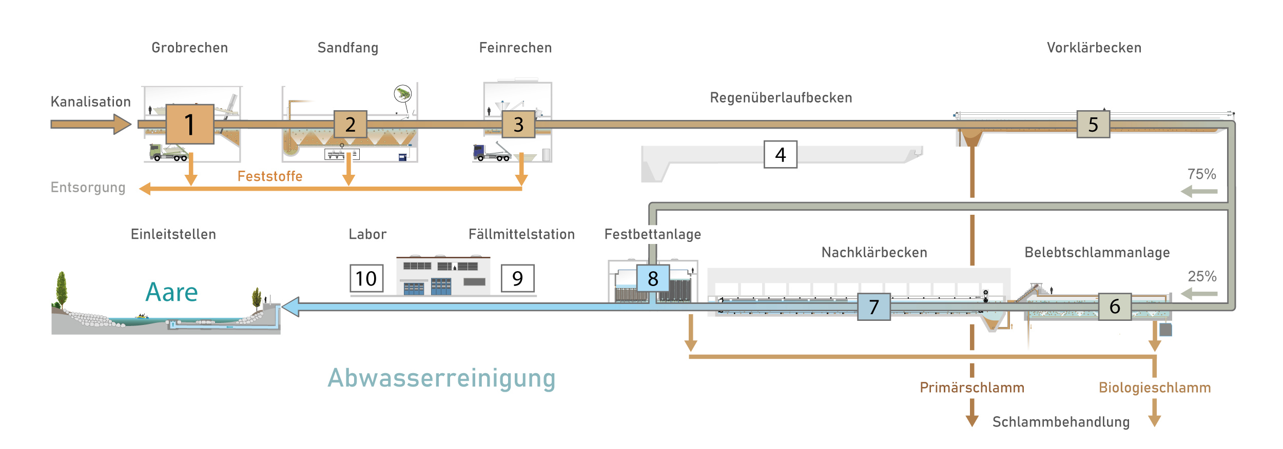 Fliessschema der Abwasserreinigung in der ARA Worblental in Worblaufen